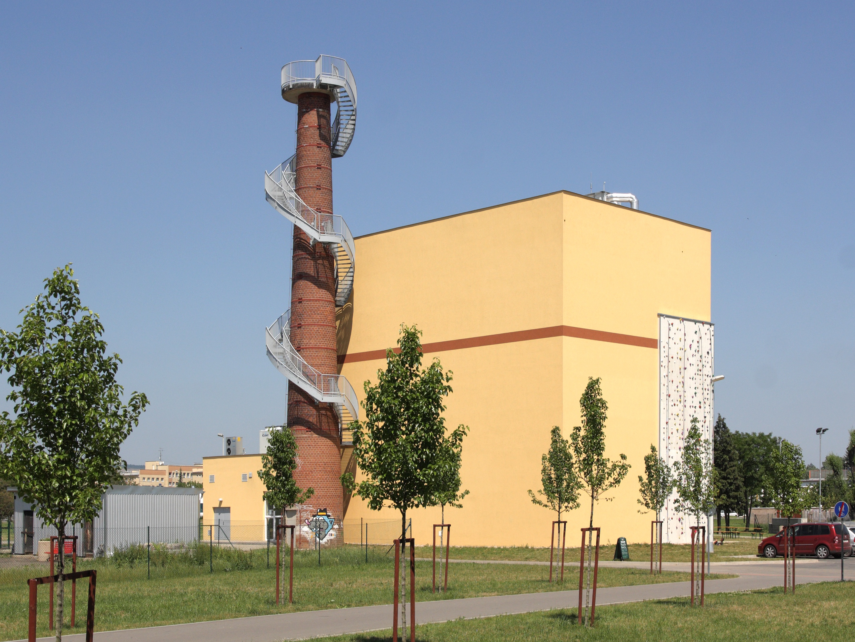 Brno, Komárov - rozhledna Komec.